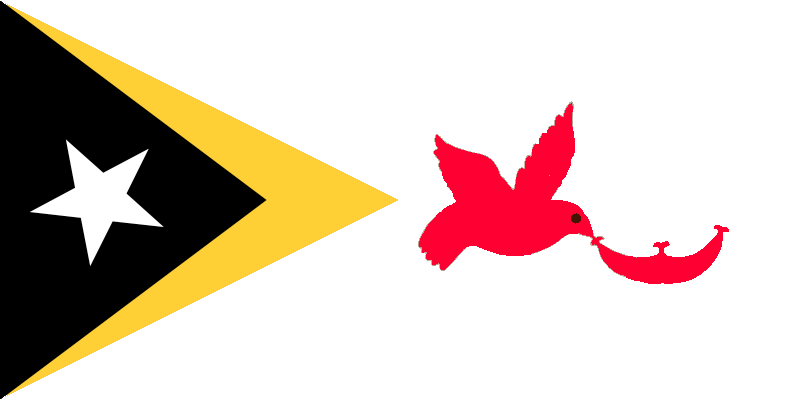 Bandeira do Baucau. A pomba vermelha com a Kaibauk (coroa tradicional timorense) no bico é o simbolo da Diocese Baucau.